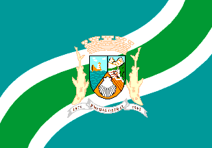 Bandeira do município de Rio das Ostras, estado do rio de Janeiro, Brasil.